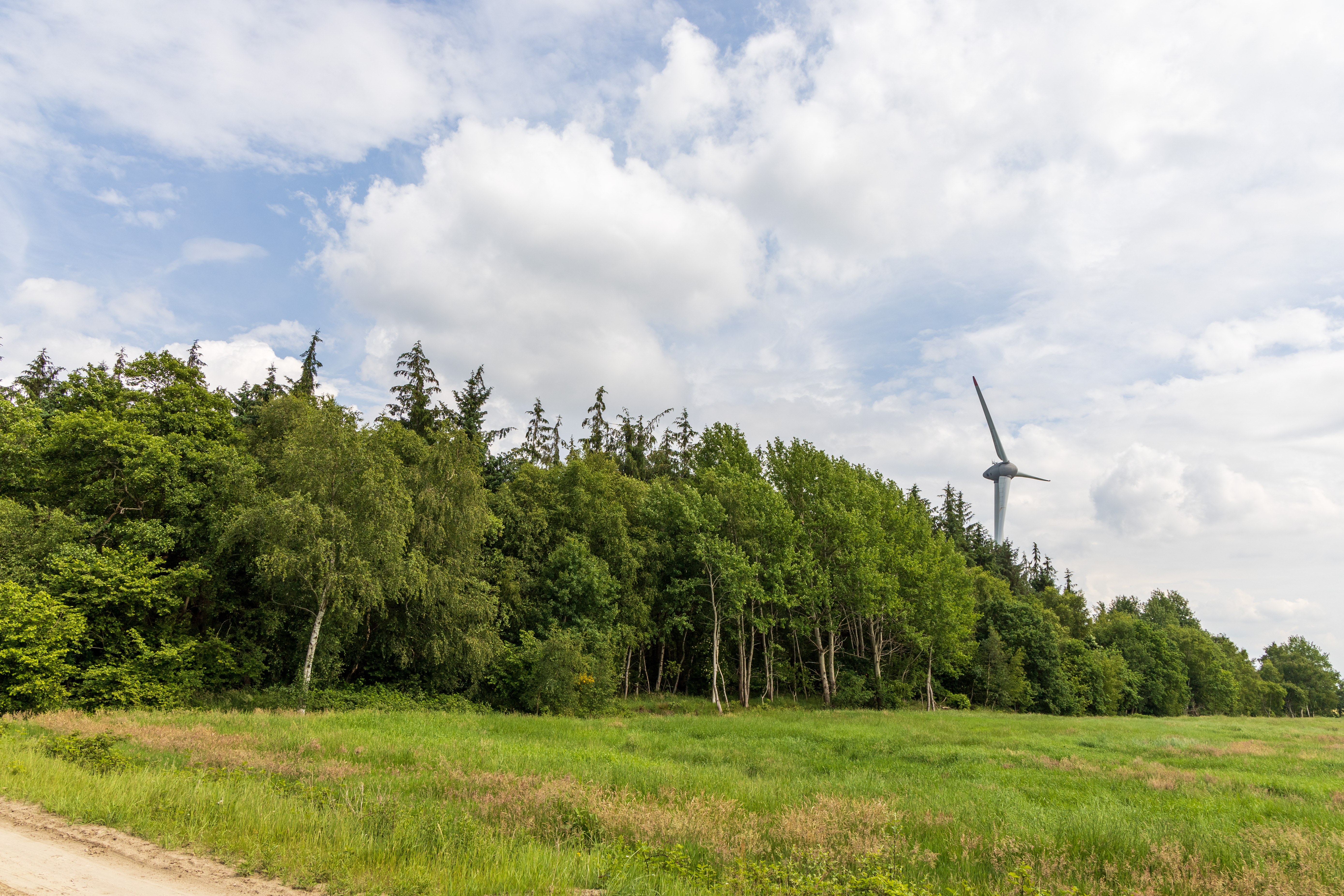 Das renaturierte Gelände der ehemaligen Richtfunkstation Tannenhausen im Landschaftsschutzgebiet Berumerfehner - Meerhusener Moor